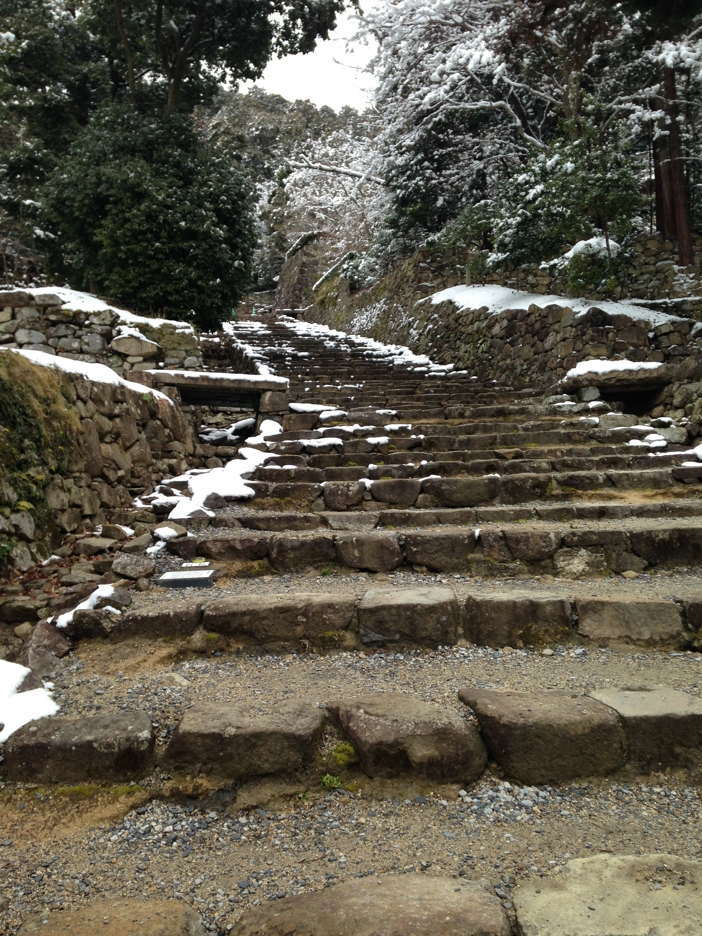 安土城・大手道